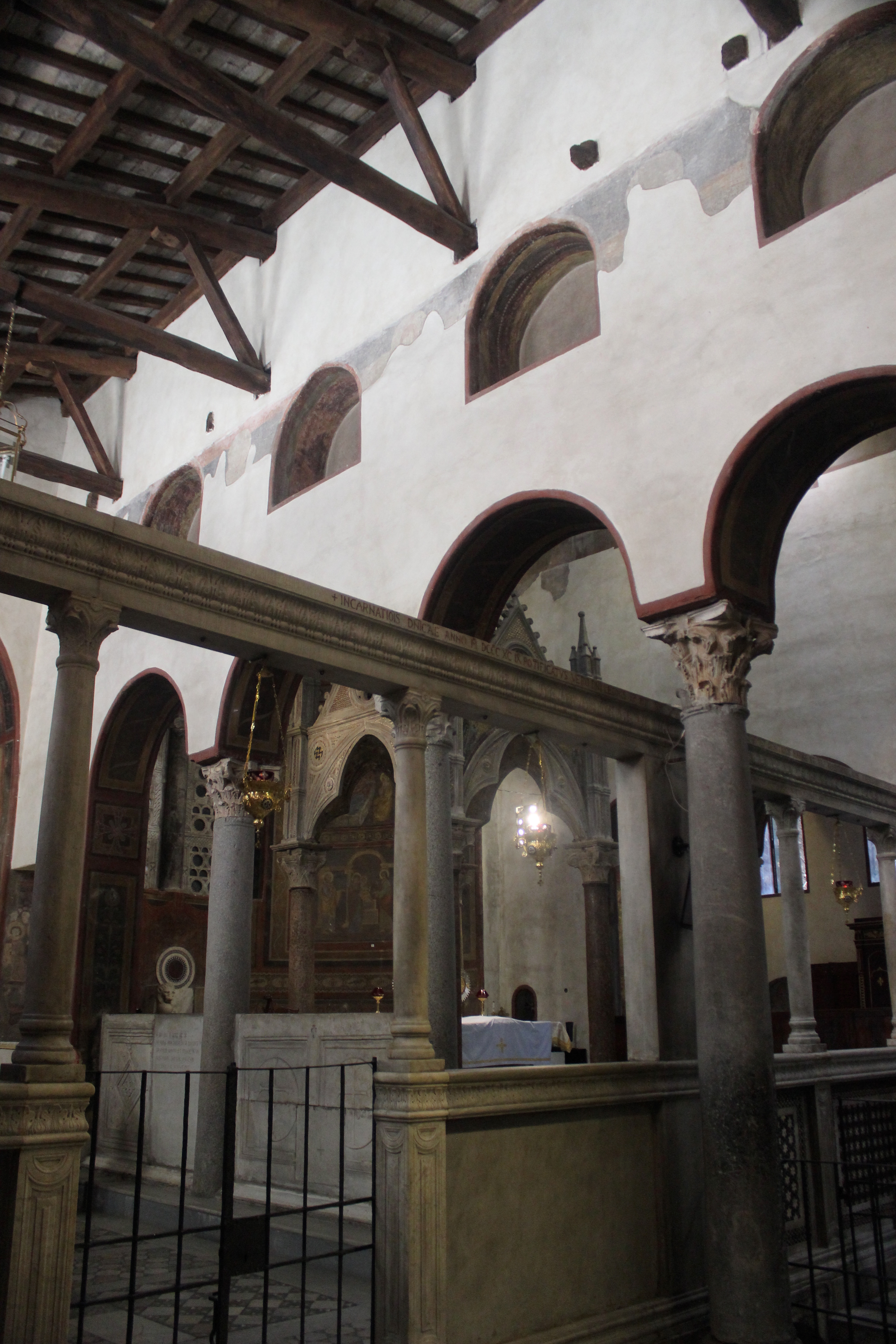 Roma. Santa Maria in Cosmedin. Interior.